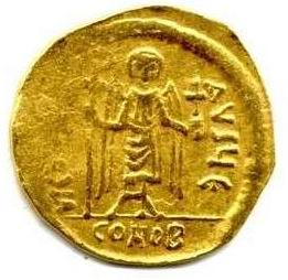 Solid Fokasa. Rewers. autor: mzopw licencja: GNU FDL